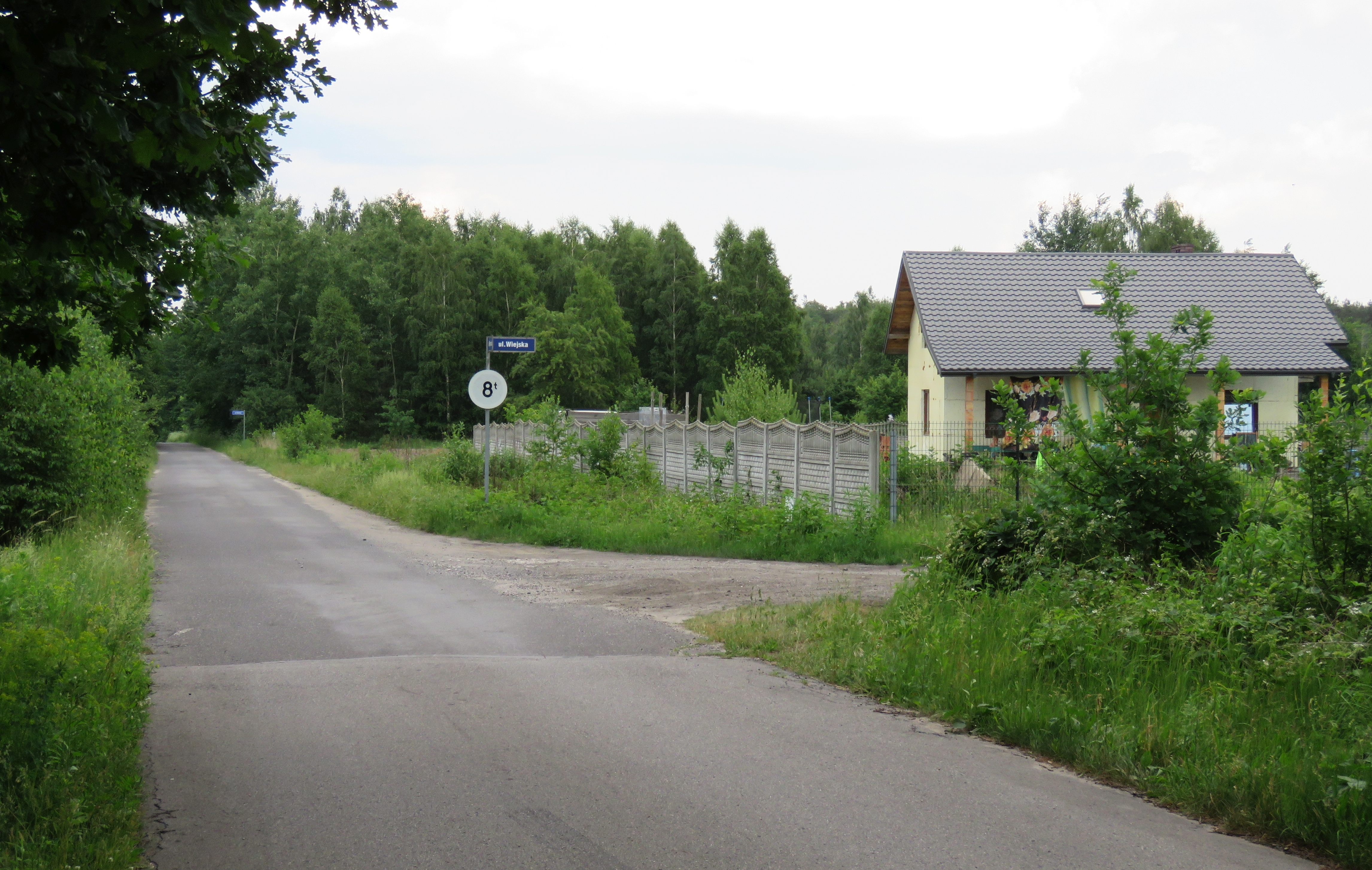 Krzyżówka